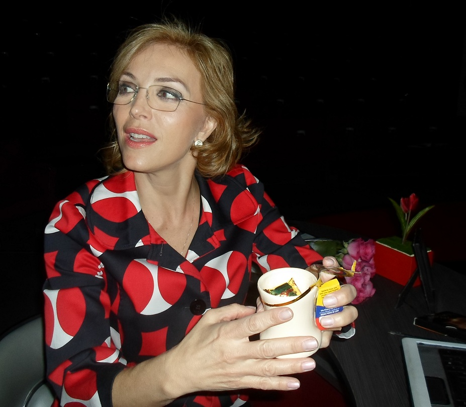 Laura Flores en el Intermedio de la Obra de Teatro Soy Mujer, Soy Invencible y ¡Estoy Exhausta!